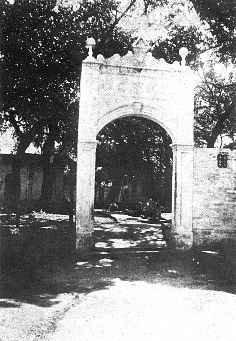 位於廣州河南的私立南武學堂校門（現廣州市南武中學）。